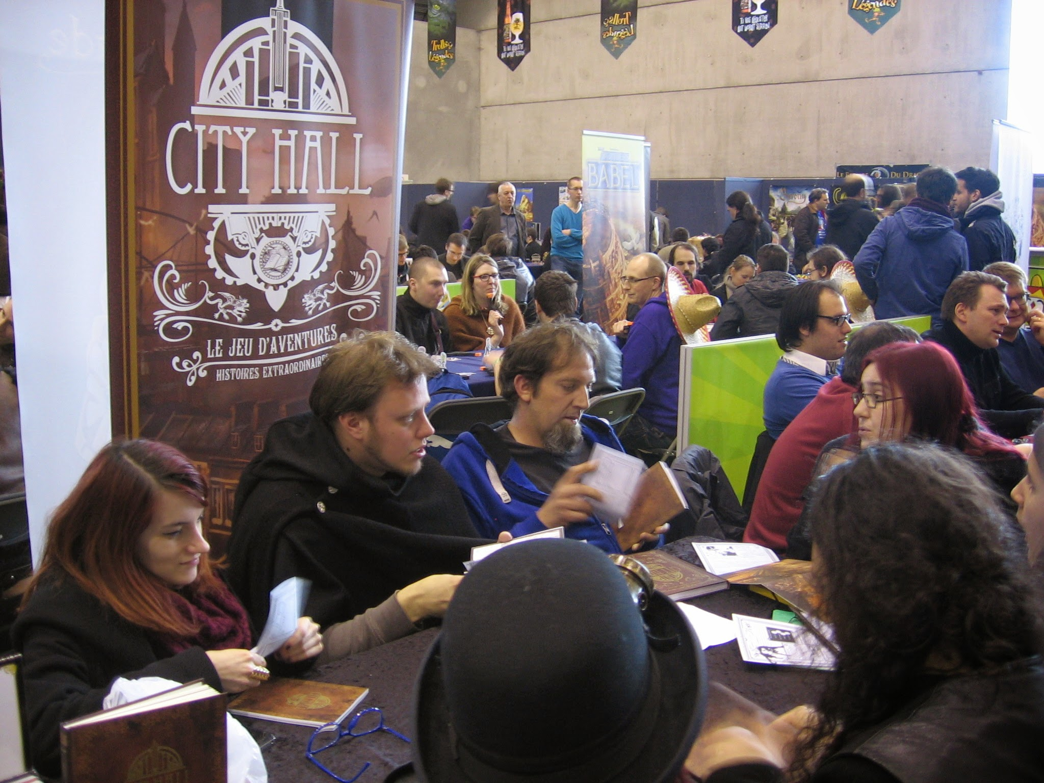 Stand des Chevaucheurs de Chimères jouant à City Hall : Le Jeu d'aventures lors de la Trolls et légendes 2015.